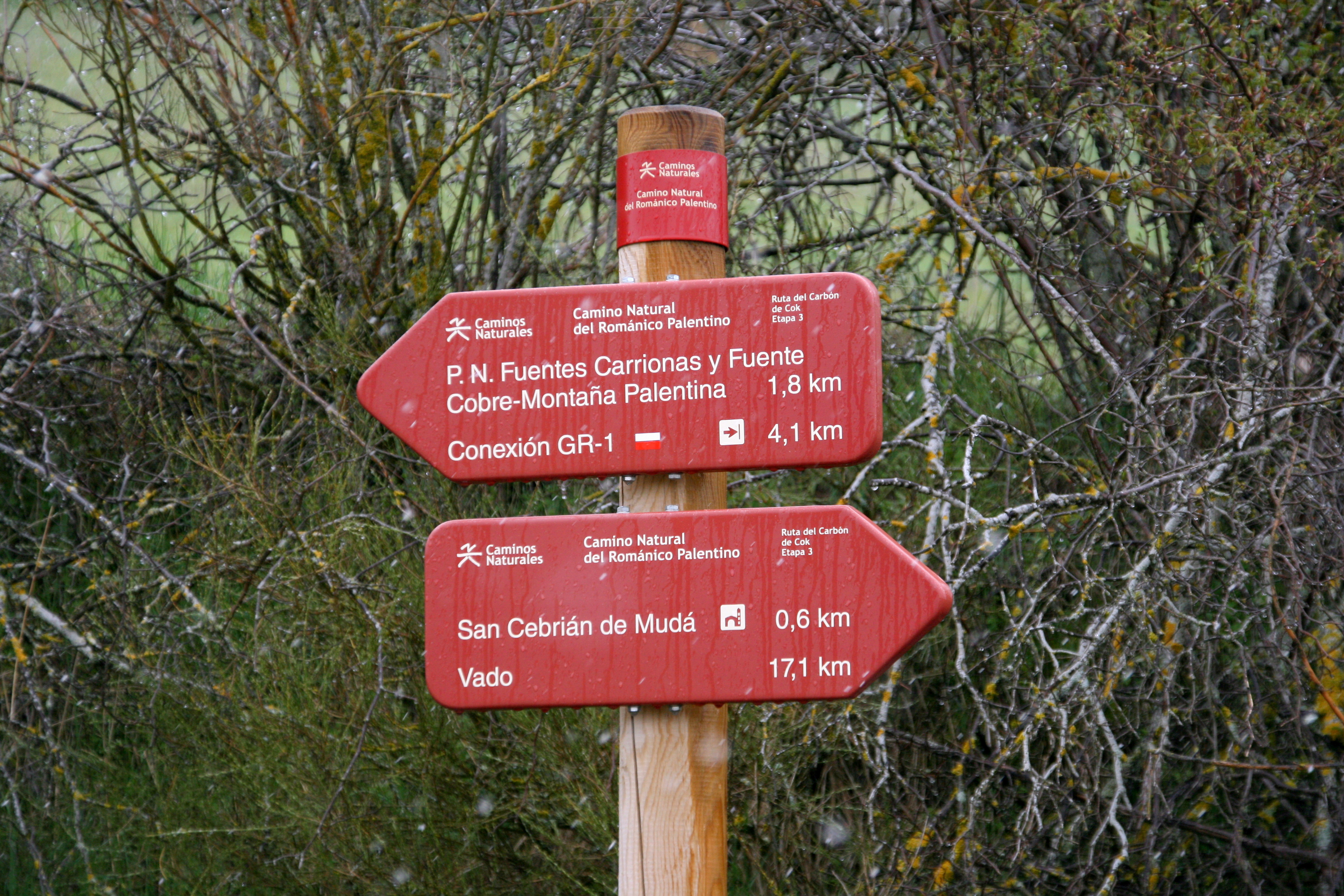 Señal del Camino Natural del Románico Palentino, en el camino de Herreruela de la Castillería, San Cebrián de Mudá This is a photography of a Special Area of Conservation in Spain with the ID: ES4140011. Natura2000 entry, EEA entry